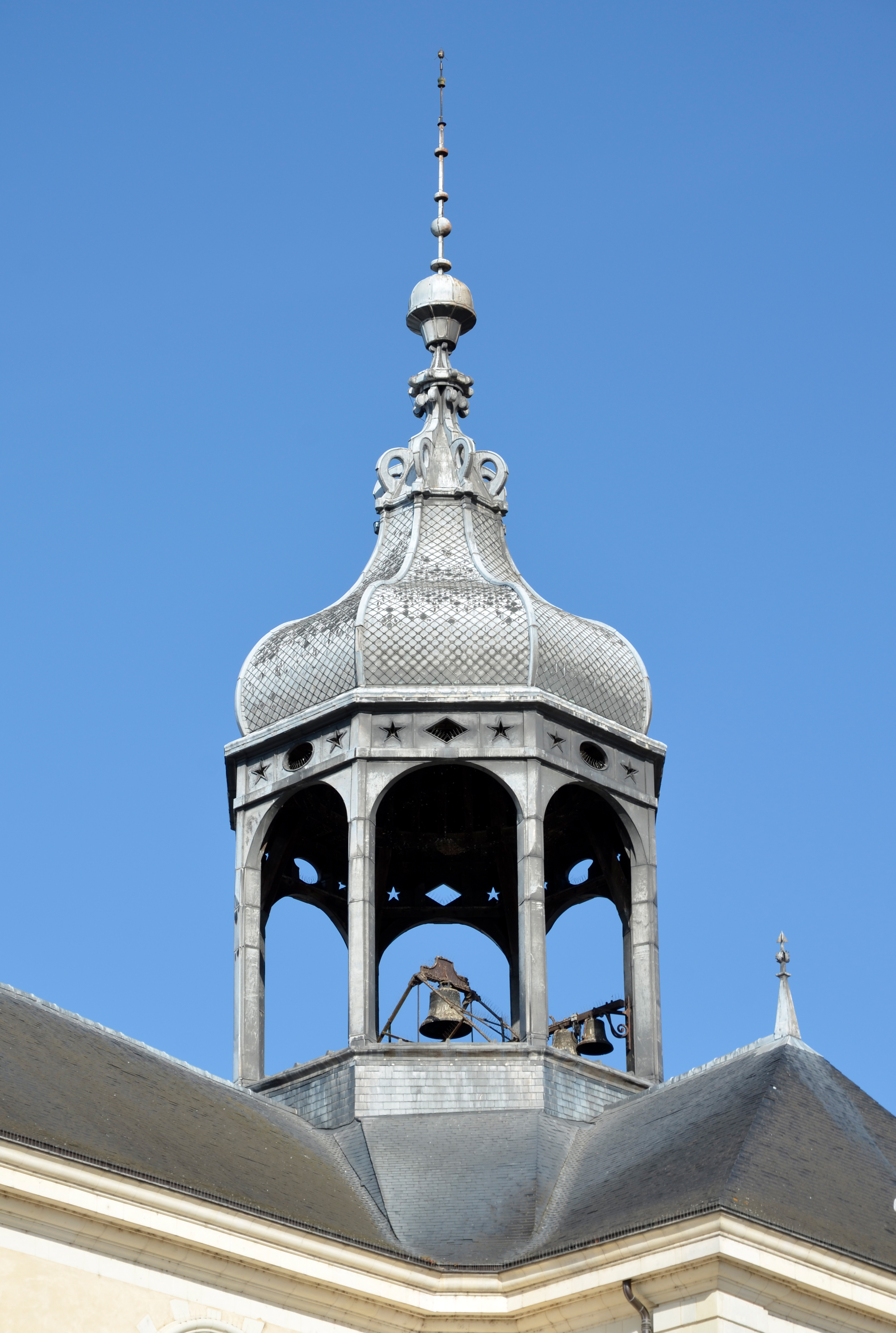 Chapelle de la Visitation - Le Mans (Sarthe) .